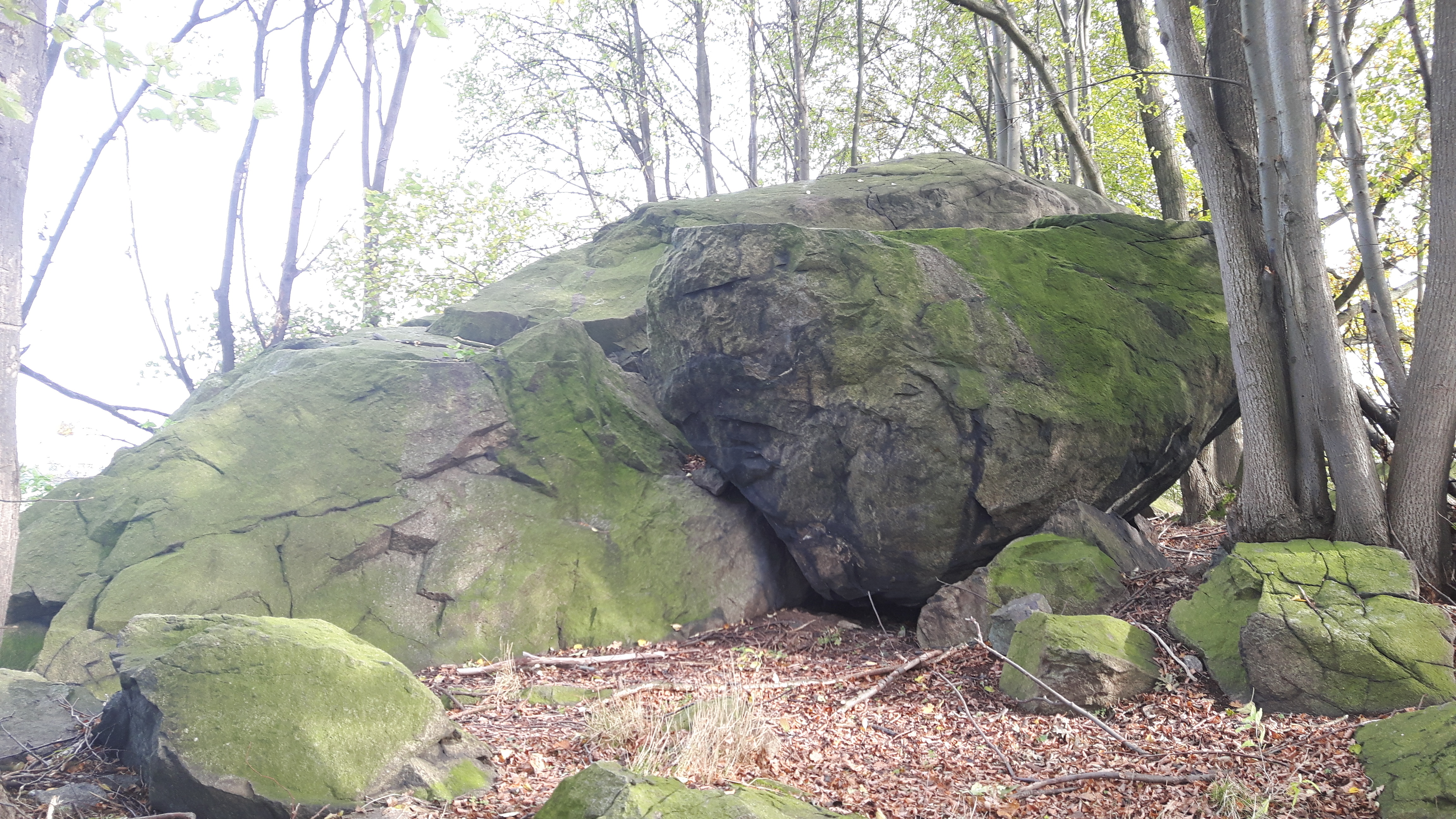 Bild der zwei größten Exemplare in der Felsengruppe nahe Kleinbautzen.